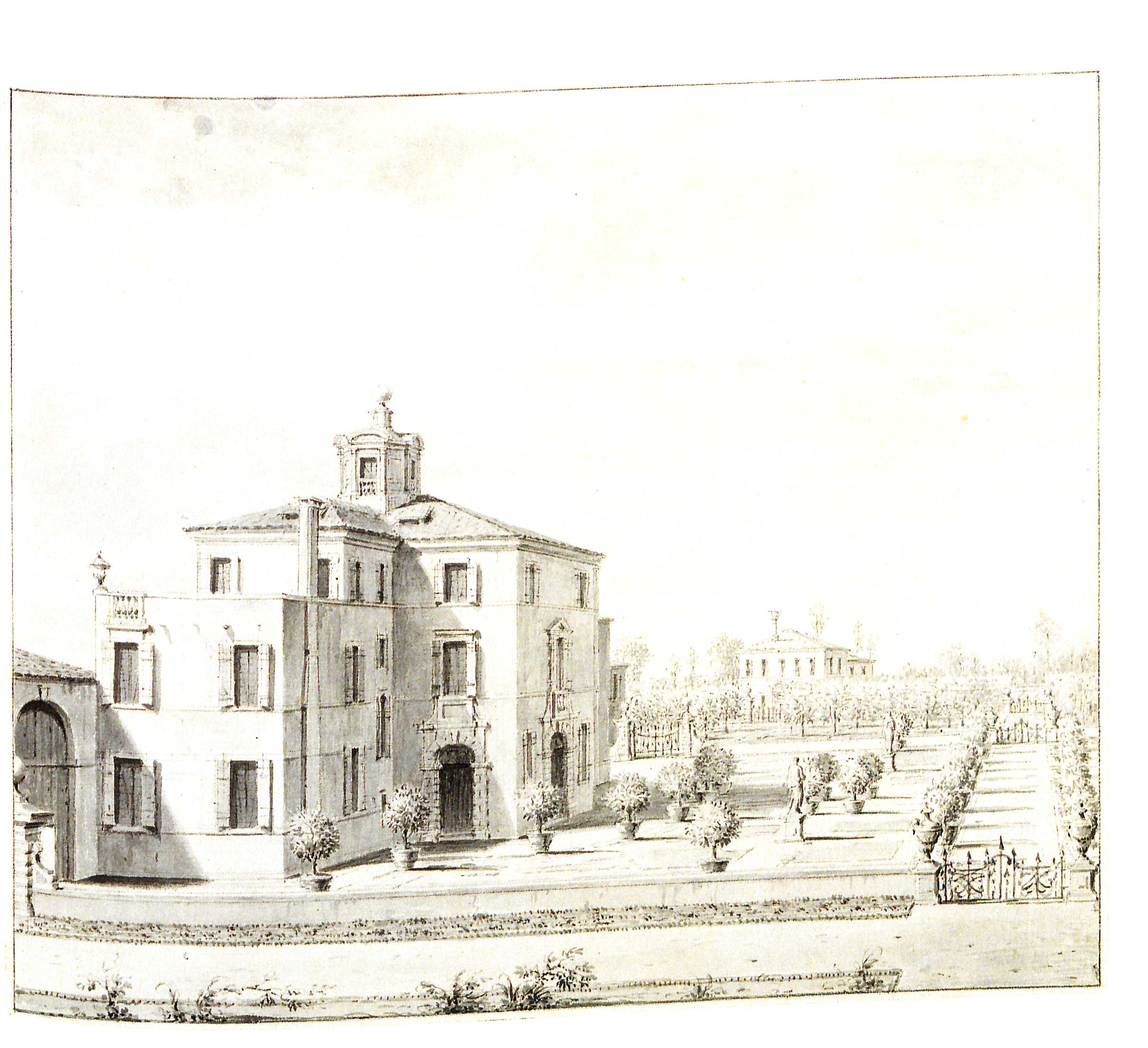 Antonio Visentini Villa in Mogliano. Gartenfront